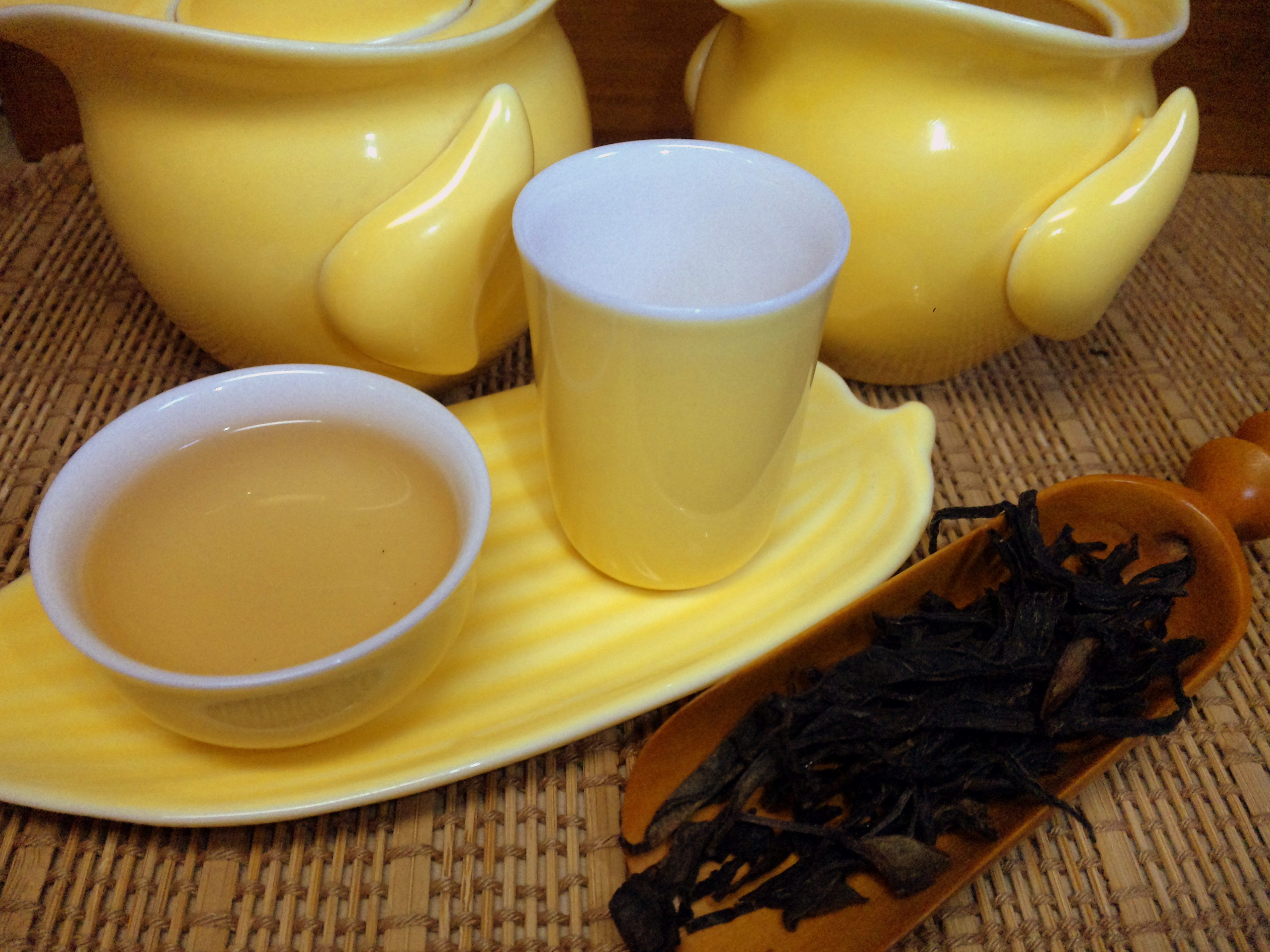 鳳凰単欉を台湾式工夫茶で